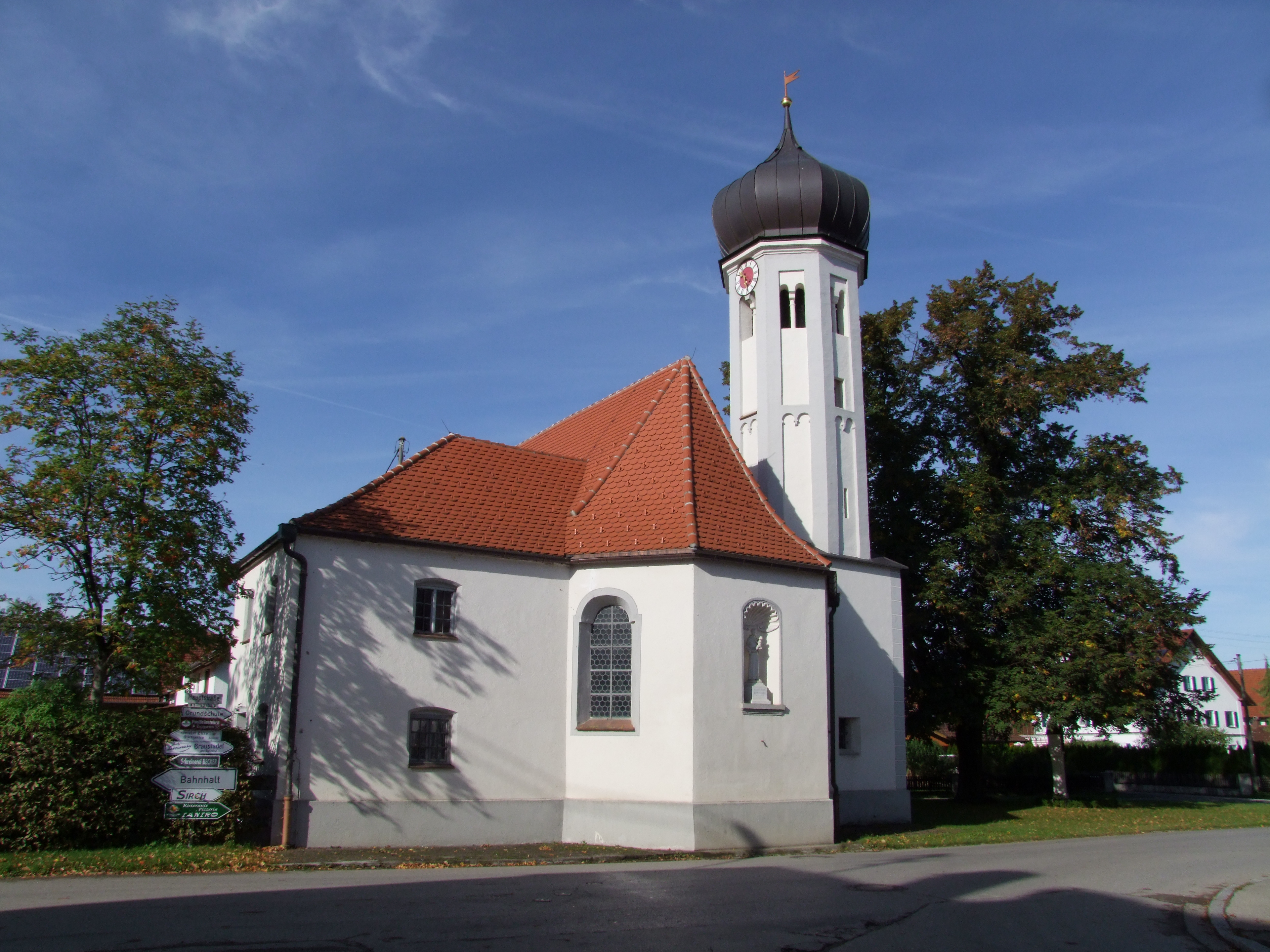 Unserer Lieben Frau im oberschwäbischen Oberrammingen,, Ortsteil von Rammingen in Bayern/Schwaben